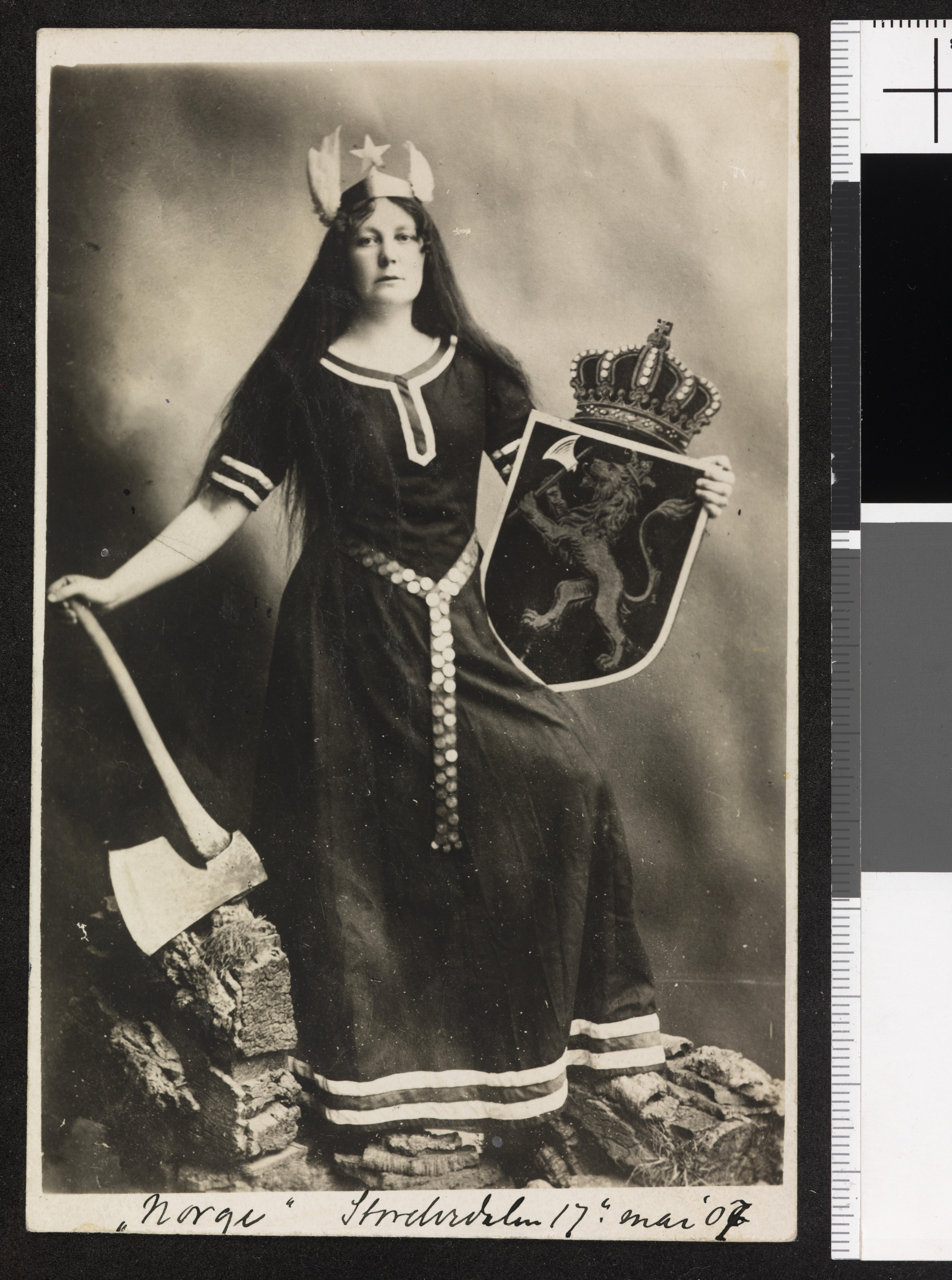 Bildet er hentet fra Nasjonalbibliotekets bildesamling. Anmerkninger til bildet var: Tittel hentet fra påskrift på komponentnr 1